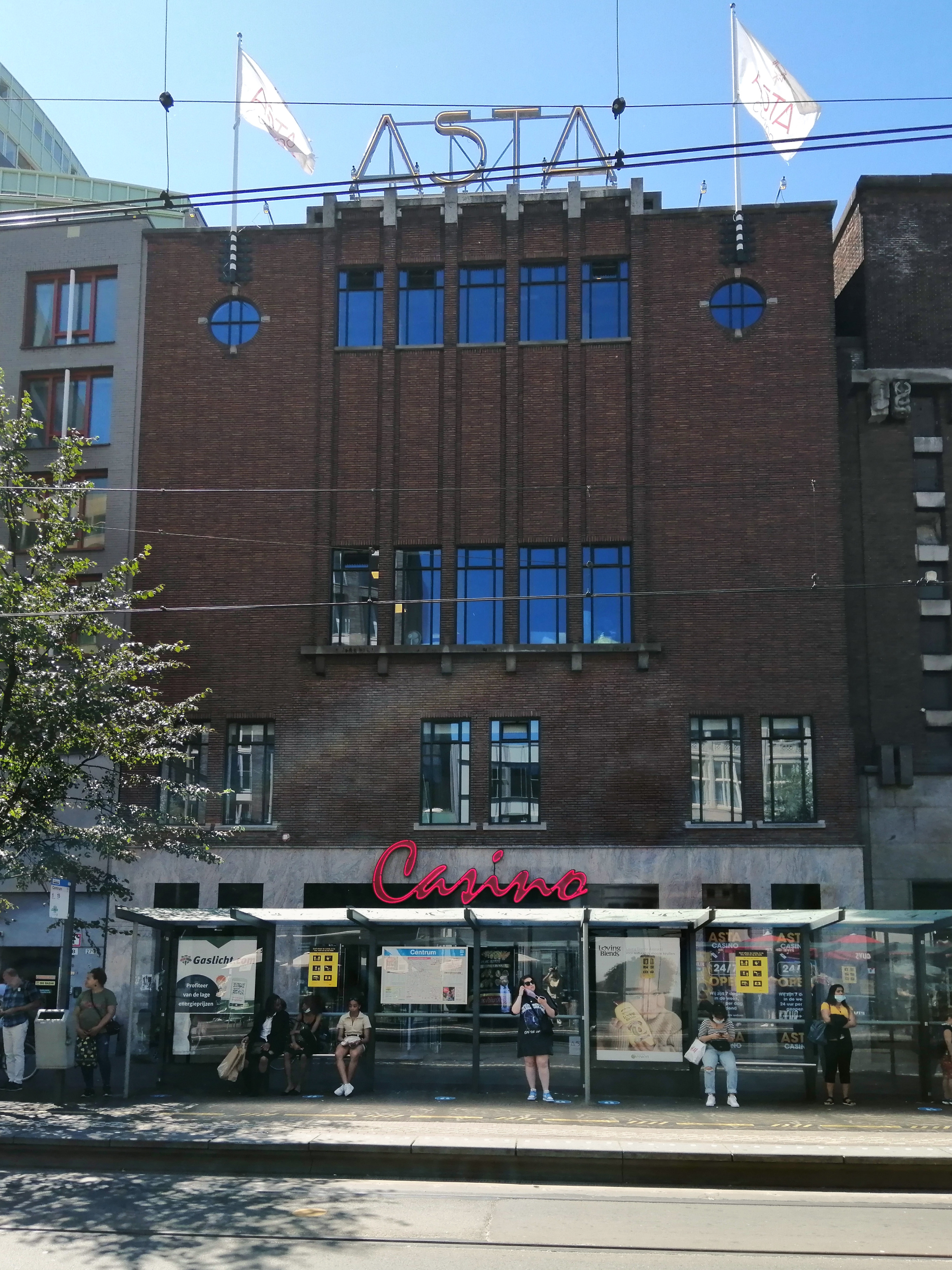 Het ASTA-gebouw aan het Spui in de zomer van 2020.